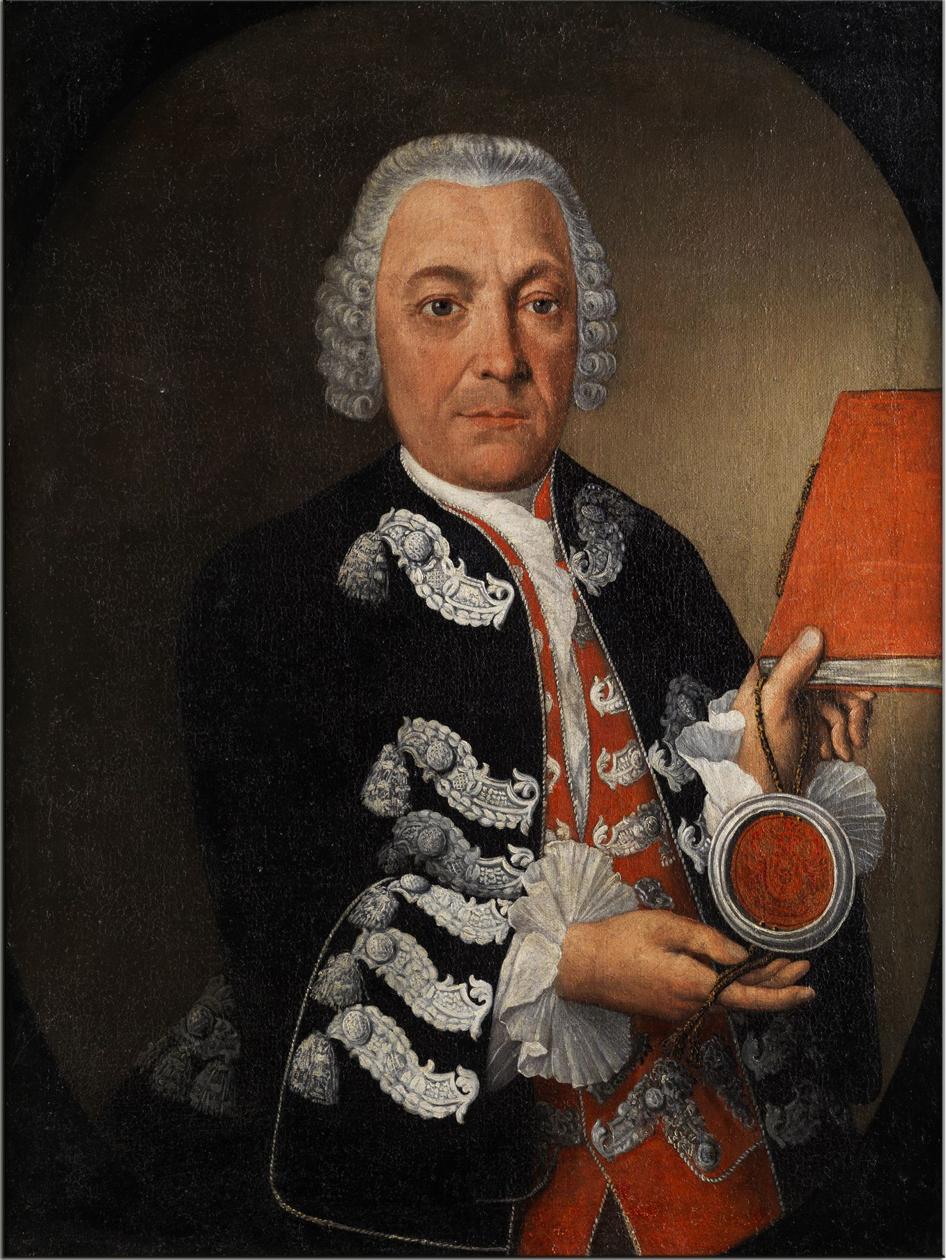 Johann Friedrich Alexander Fürst zu Wied (1706–1791), Öl auf Leinwand. 86 x 64,5 cm counterpart